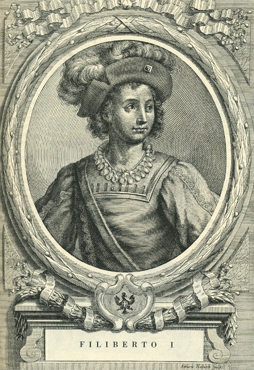 Filiberto I di Savoia (1465–1482)